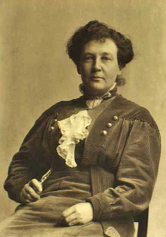 Ingrid Jespersen (1867-1938), rektor for Ingrid Jespersens skole i København.